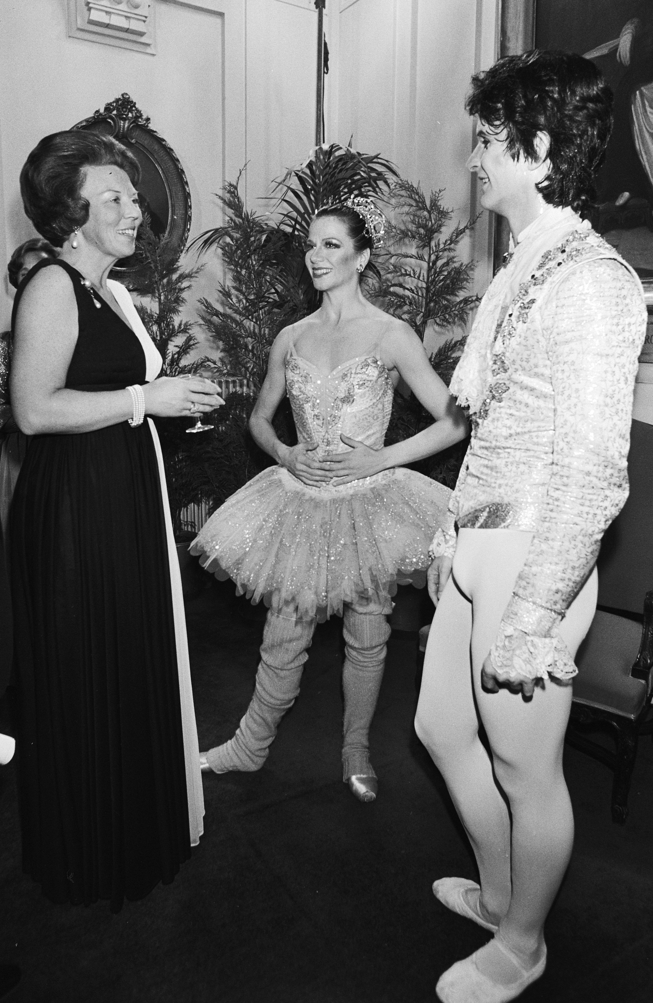 Koningin Beatrix in gesprek met Martine Hamel en Kevin Mc Kenzie van het American Ballet Theatre